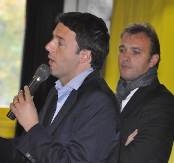 Matteo Renzi e Matteo Richetti, politici del Partito Democratico